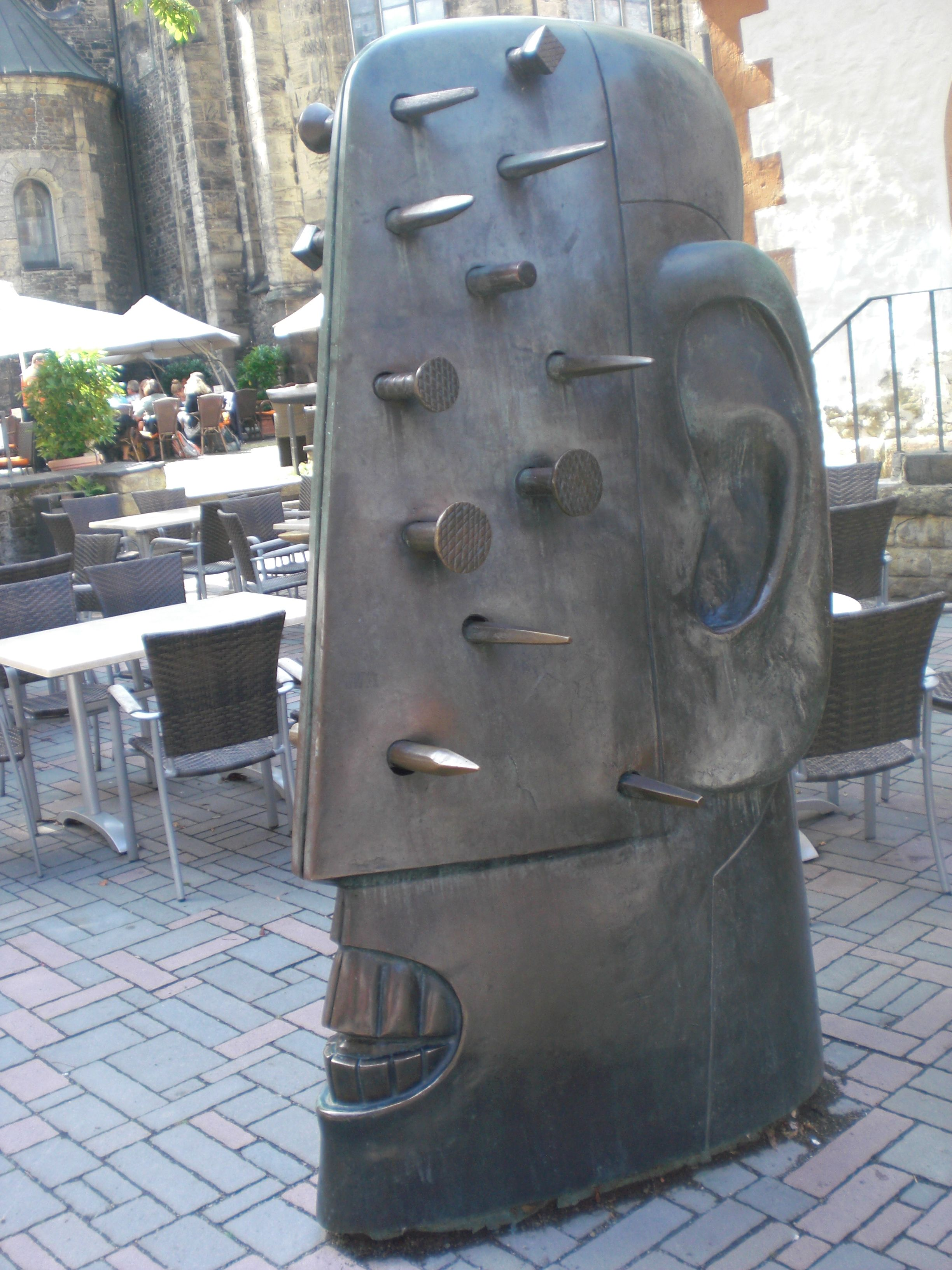 Moderna arto en Goslar